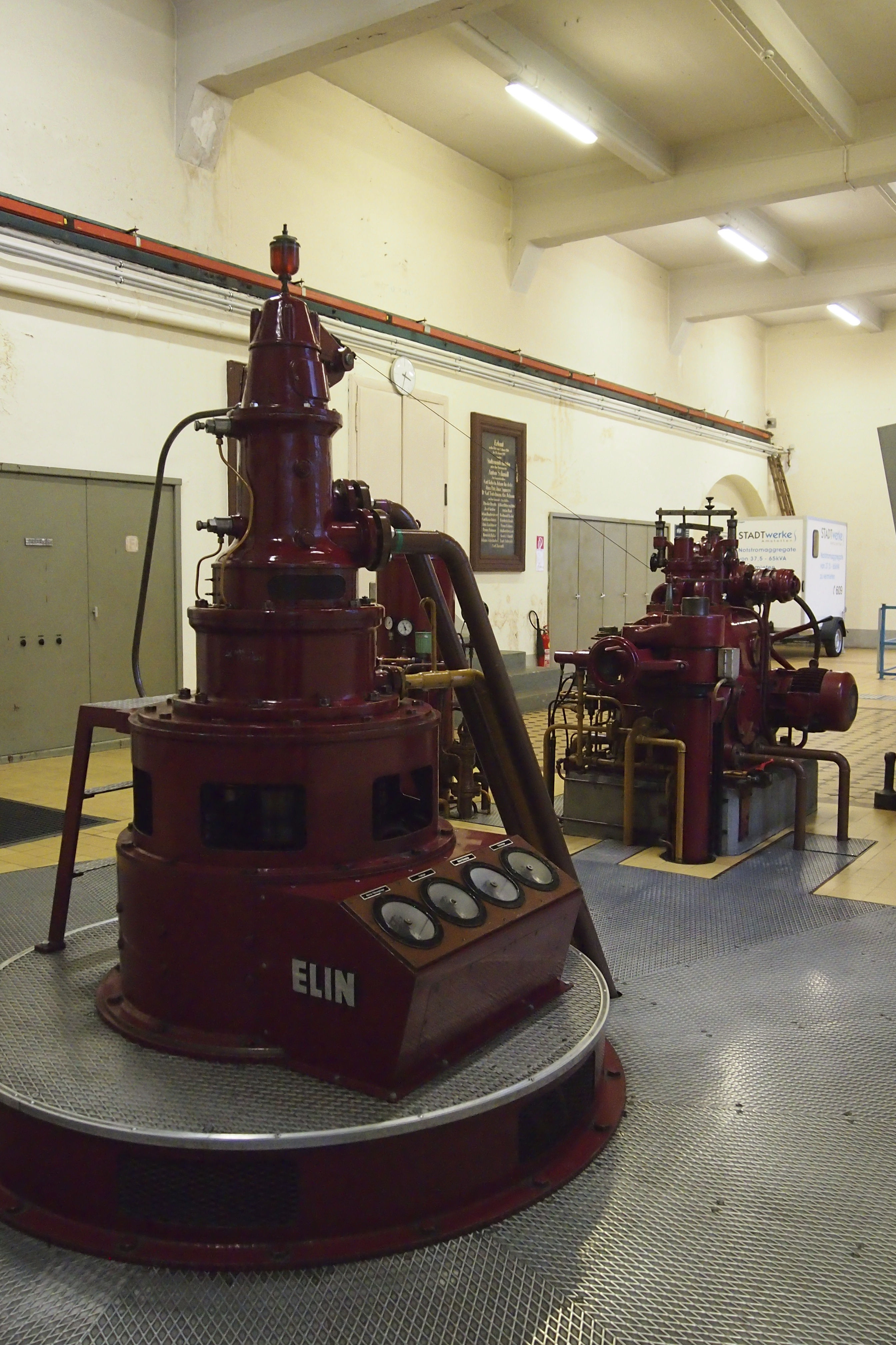 alter, noch im Betrieb befindlicher Maschinensatz (Generator)